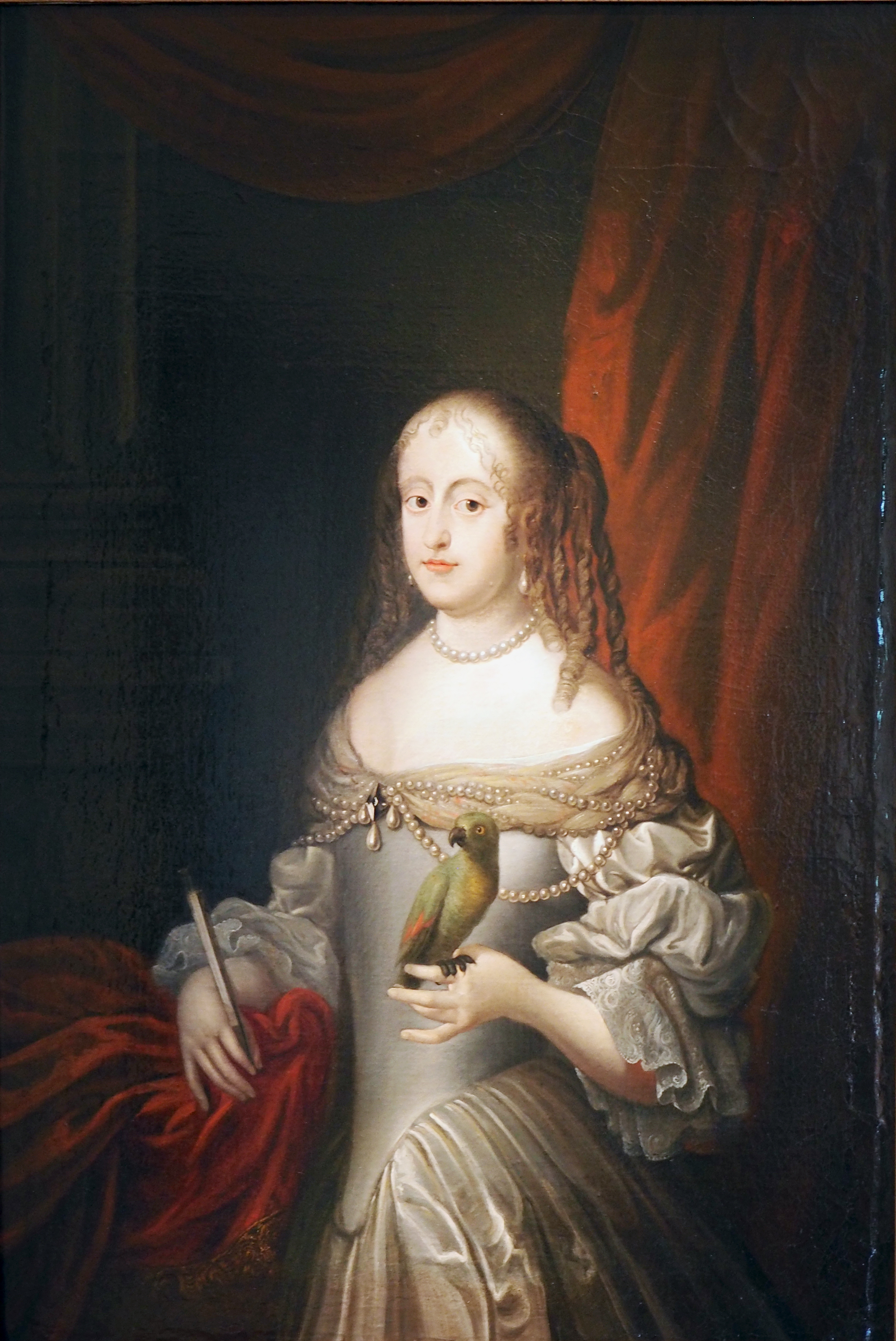 Sophie Amalie von Braunschweig-Calenberg (1628-1685), 1648 Königin von Dänemark und Norwegen